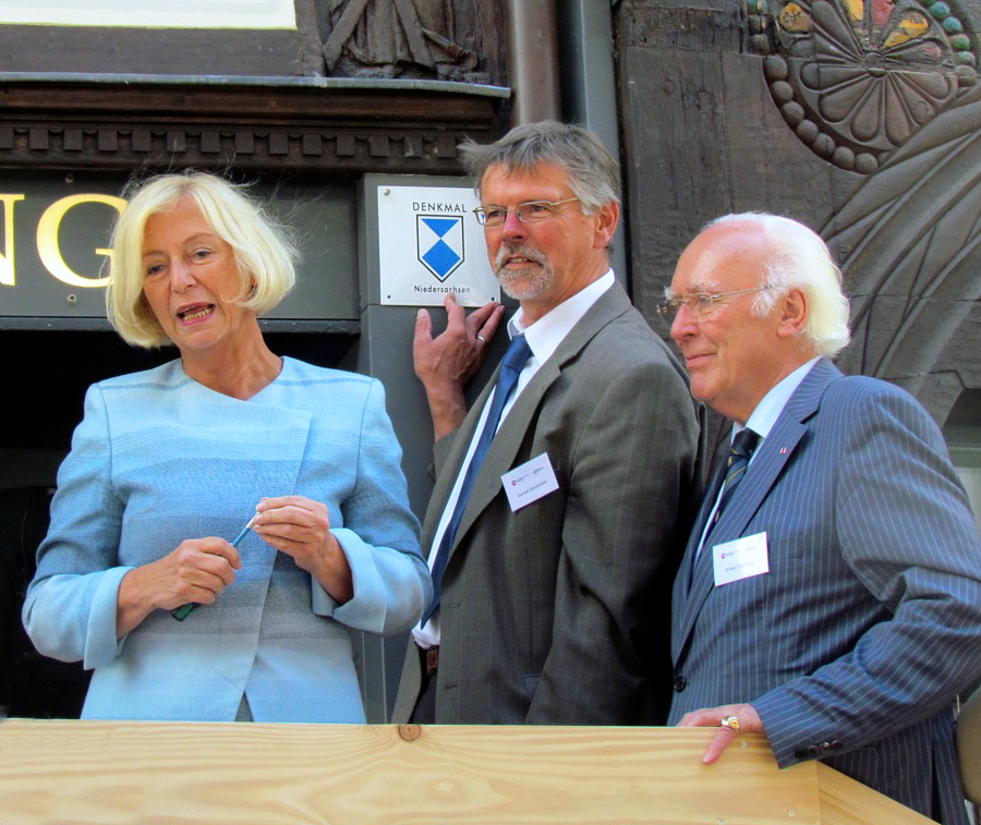 Anbringen der ersten Denkmalplakette in Niedersachsen am Eickesches Haus zum 14. Tag der Niedersächsischen Denkmalpflege am 9. Juni 2012 in Einbeck durch die Niedersächsische Ministerin für Wissenschaft und Kultur Johanna Wanka, rechts Städtischer Baudirektor Gerald Strohmeier und Vorsitzender der Eickeschen Stiftung Robert Stafftage